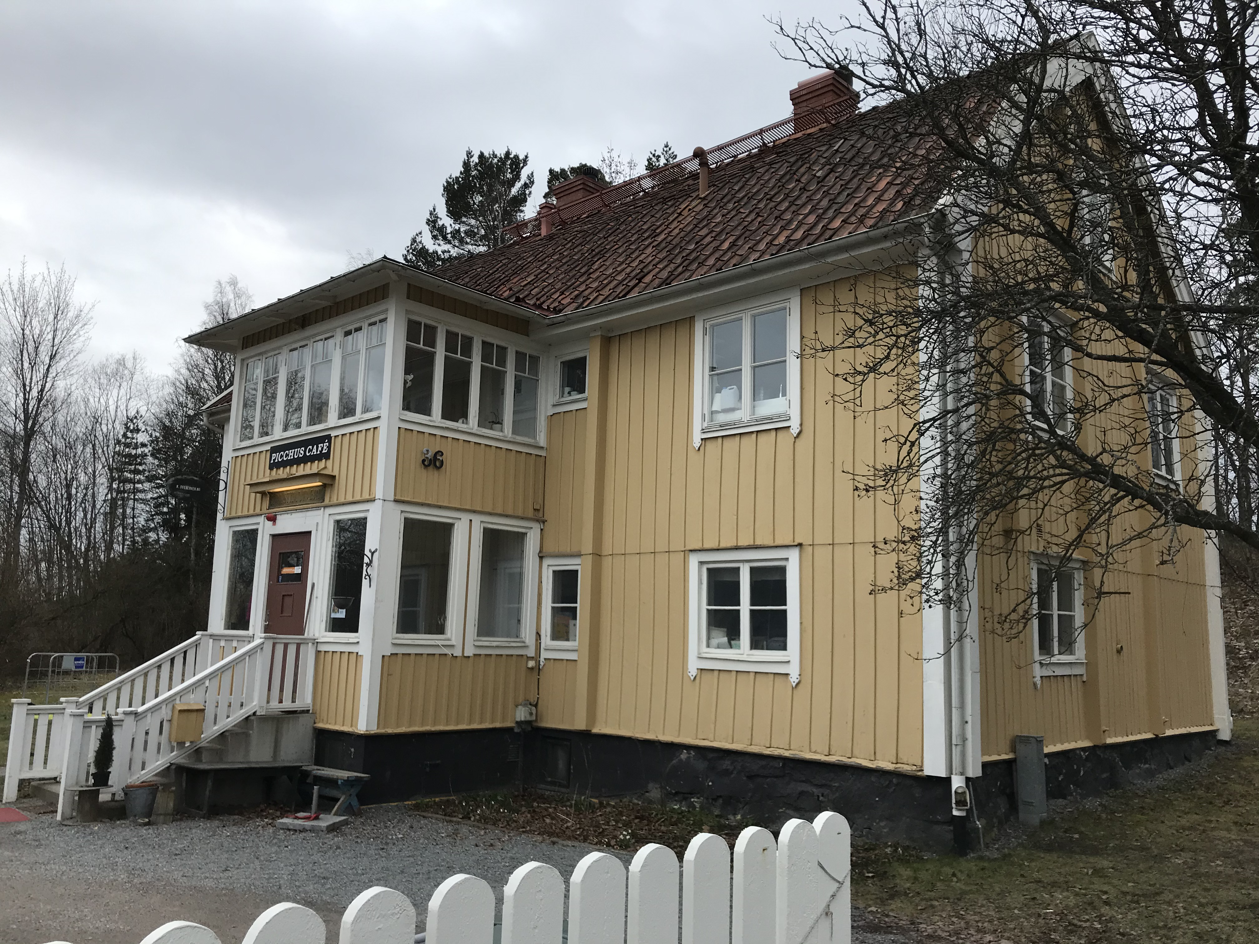 Gamla Apoteket Hammarby, Upplands Väsby, den 15 mars 2020.